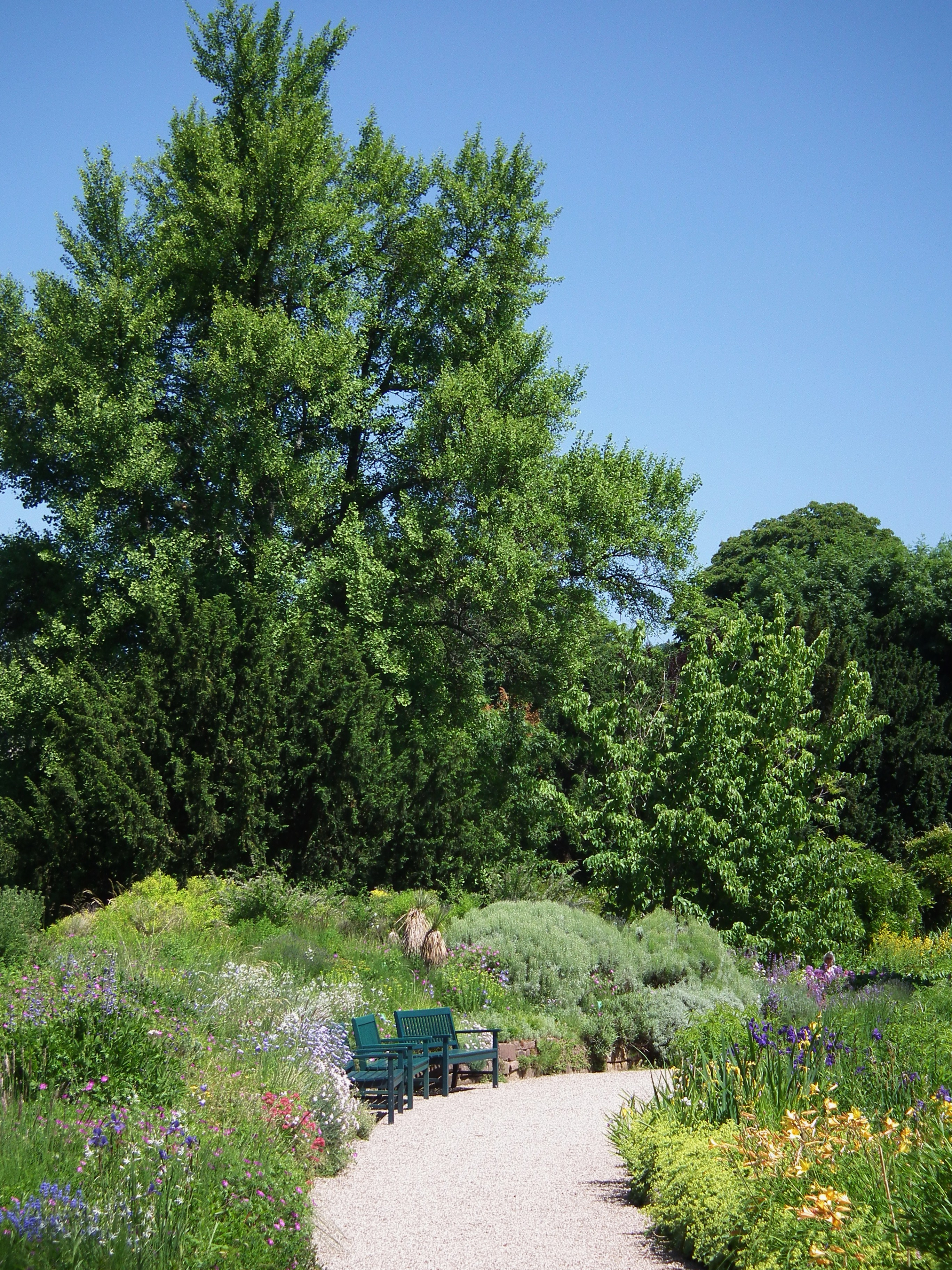 Rundweg im Schau- und Sichtungsgarten Hermannshof in Weinheim (Baden-Württemberg, Deutschland)